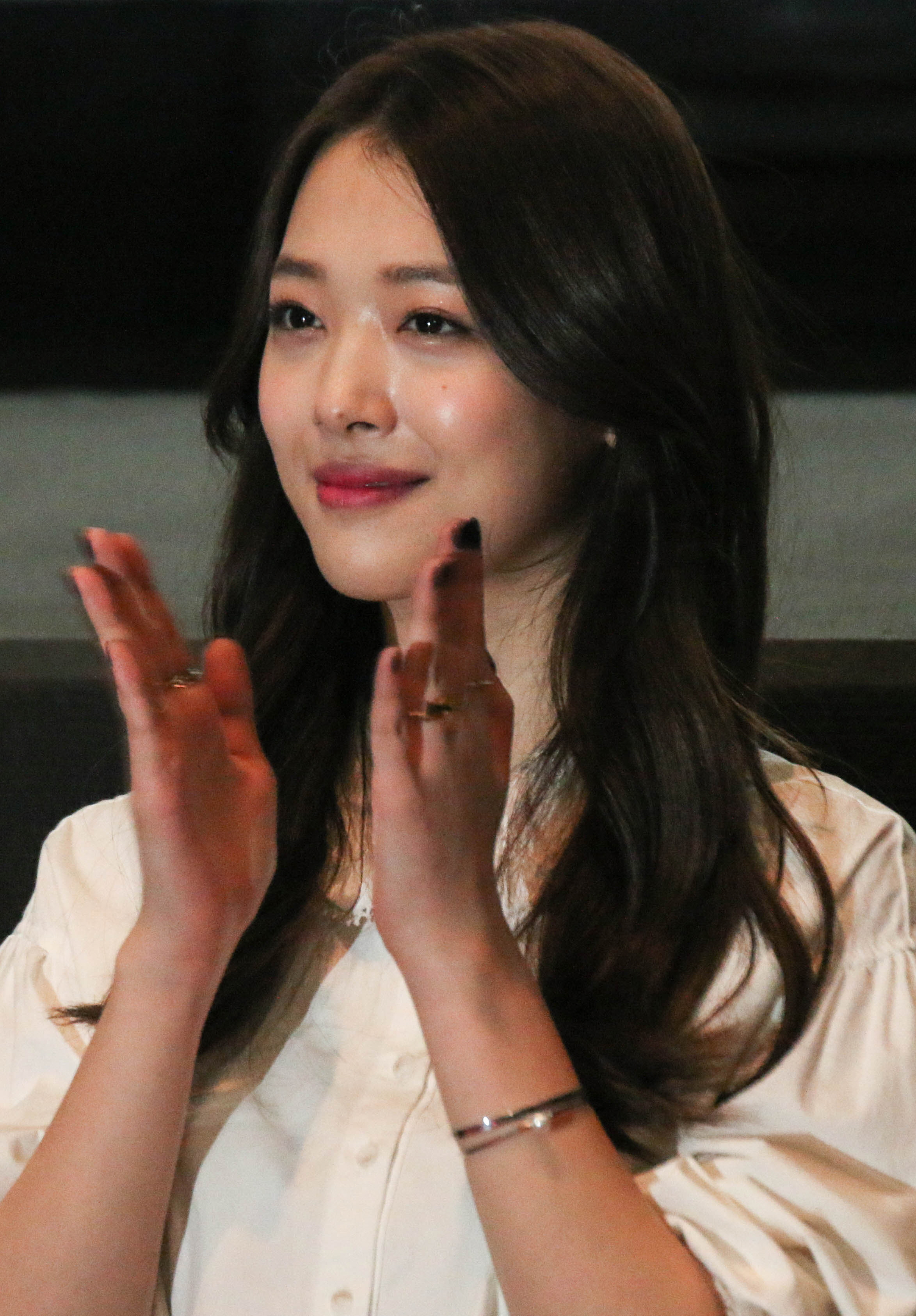 141109 설리 롯데시네마 노원점 패션왕 무대인사